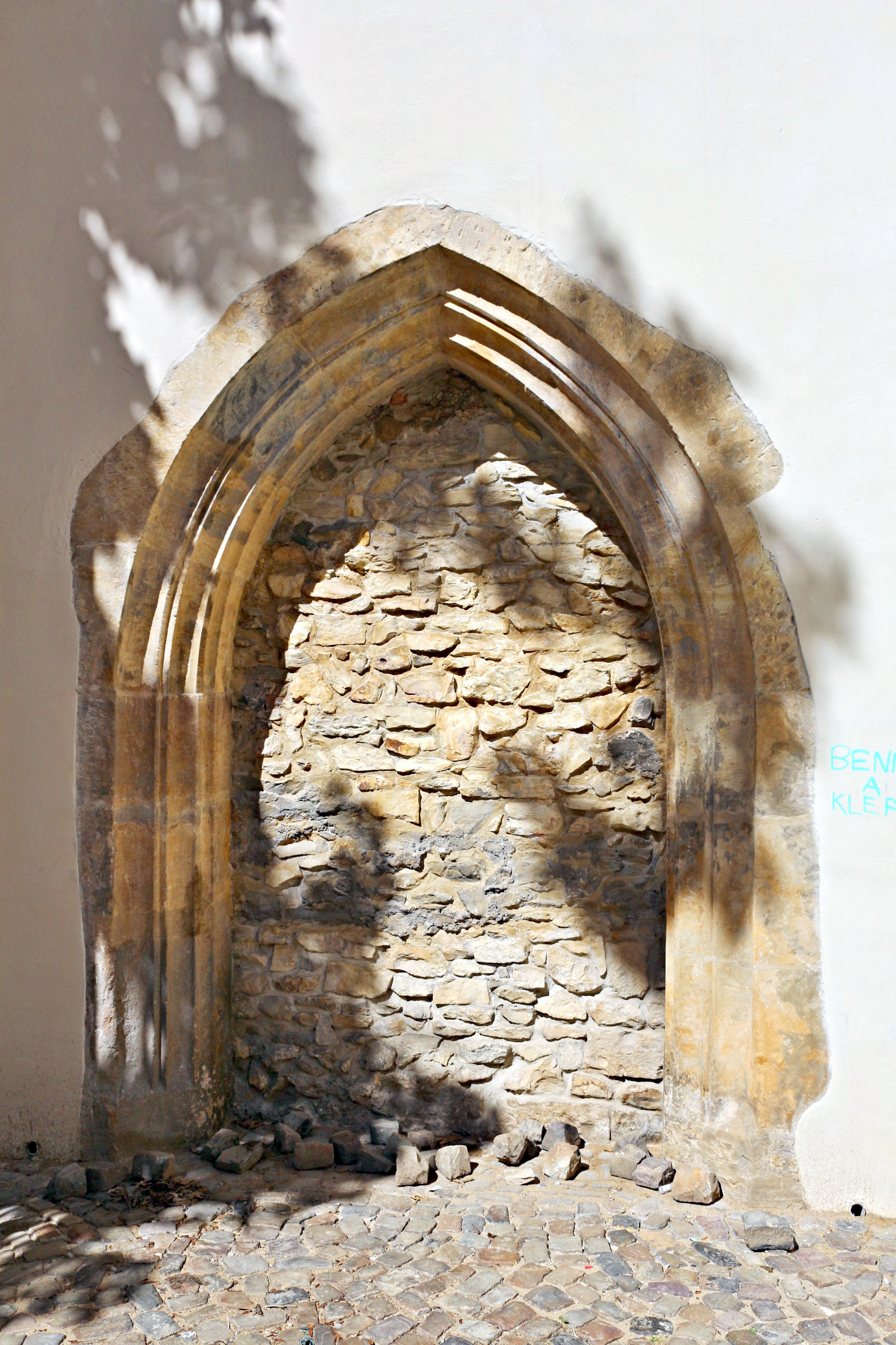 Kostel svaté Anny na Starém Městě